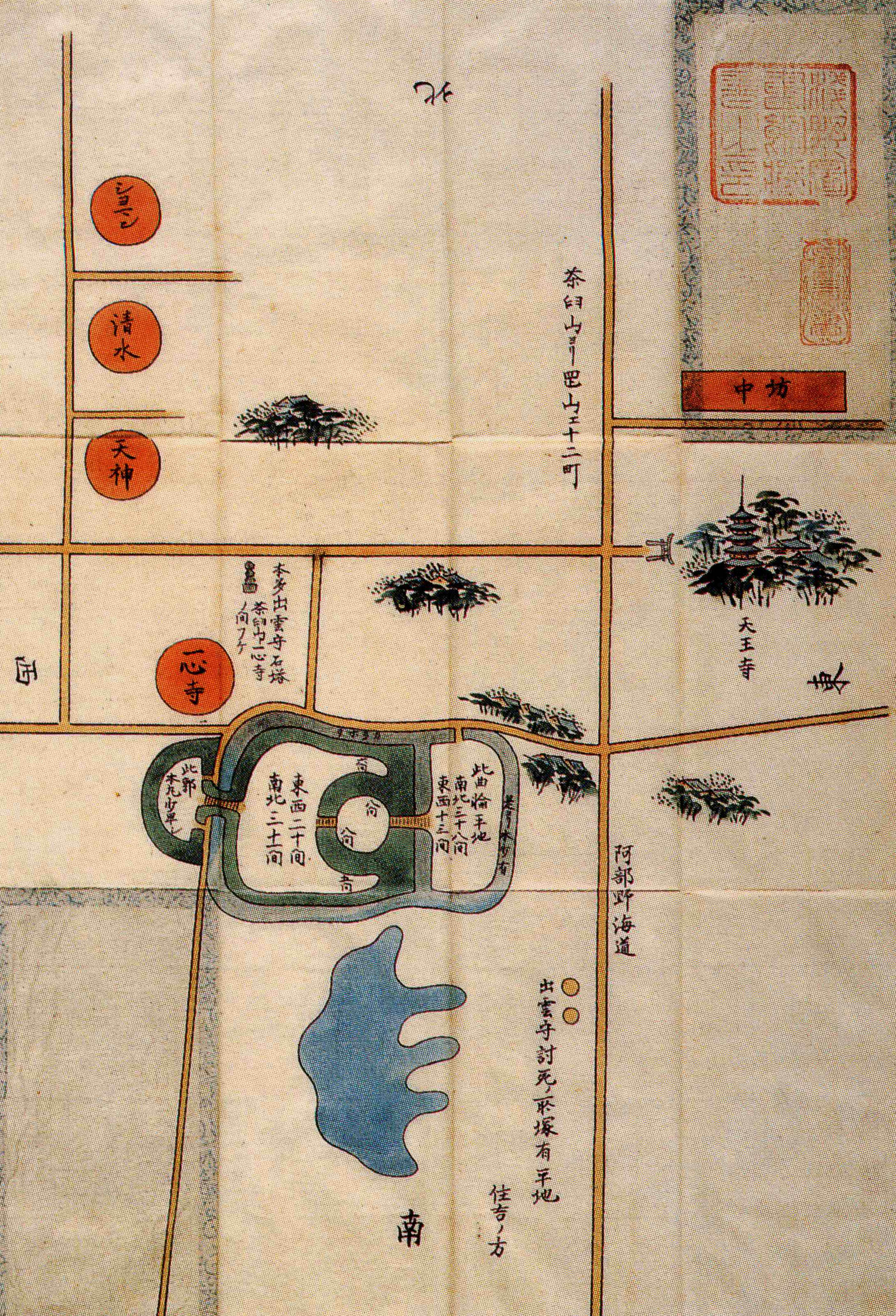 茶臼山城